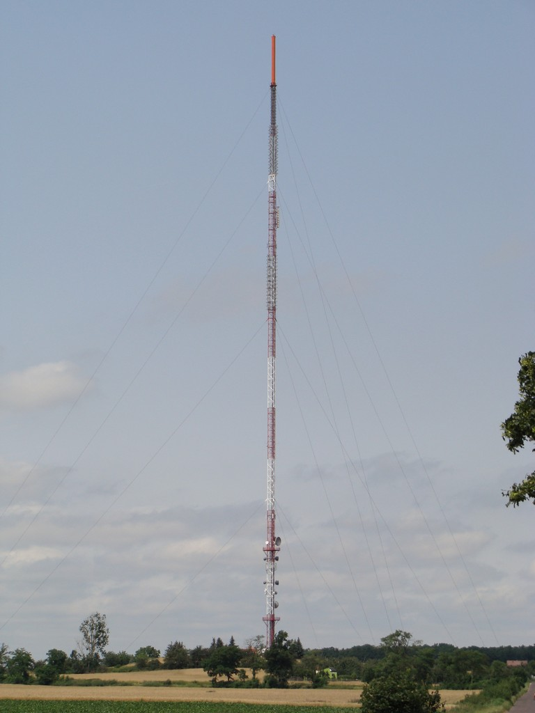 Góra, Wieża RTV